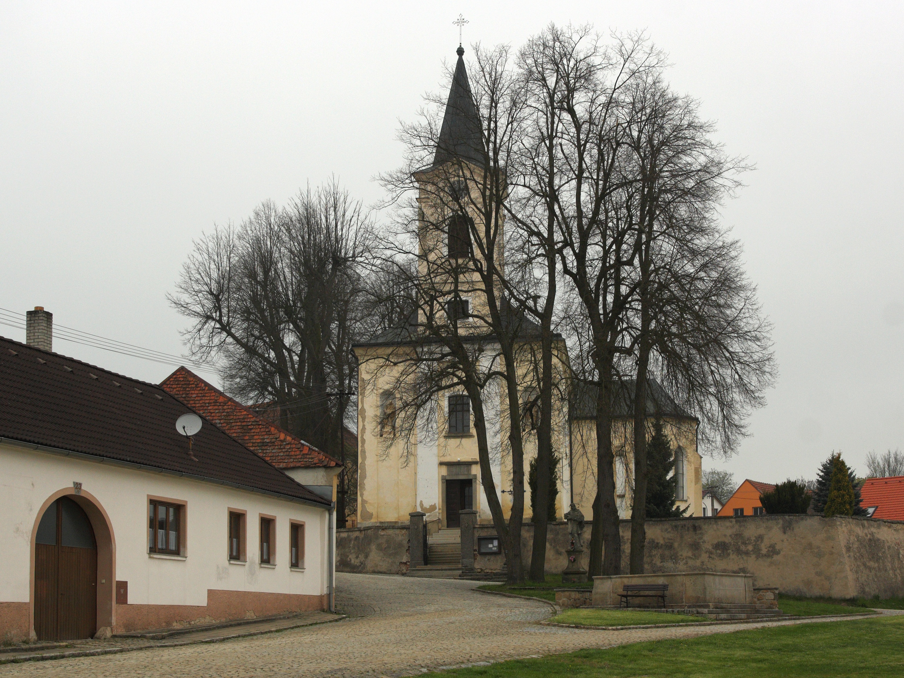 Mrákotín (okr. Jihlava) - náměstí s kostelem sv Jiljí.